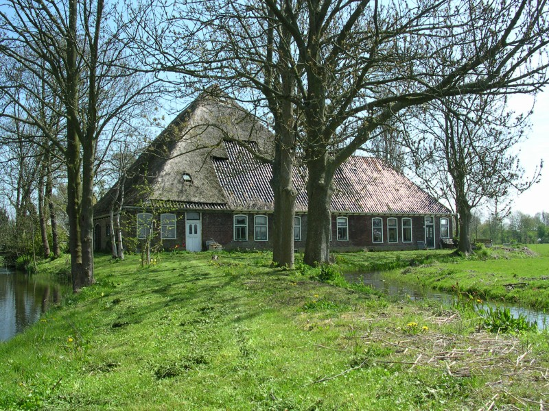 Stolpboerderij in de buurtschap Kerkbuurt in Andijk. A farm in the hamlet Kerkbuurt, Andijk.